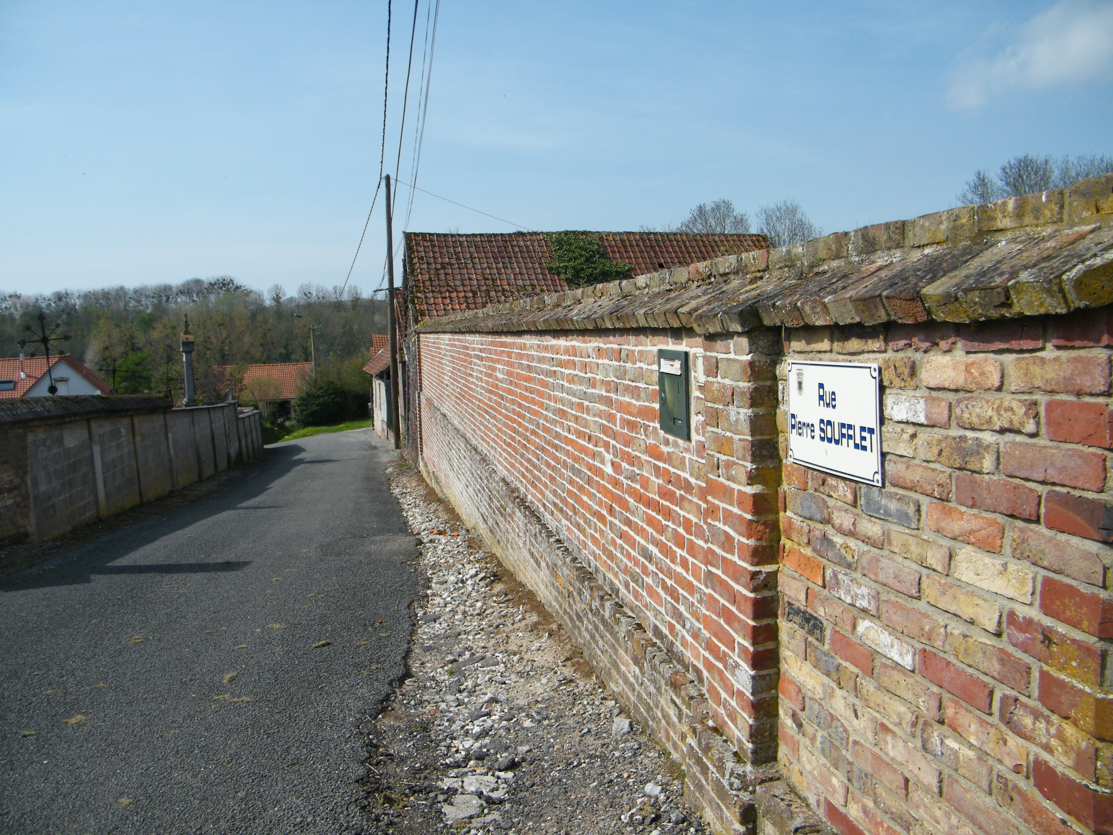 Bouillancourt-sous-Miannay, Somme, Fr, rue Soufflet